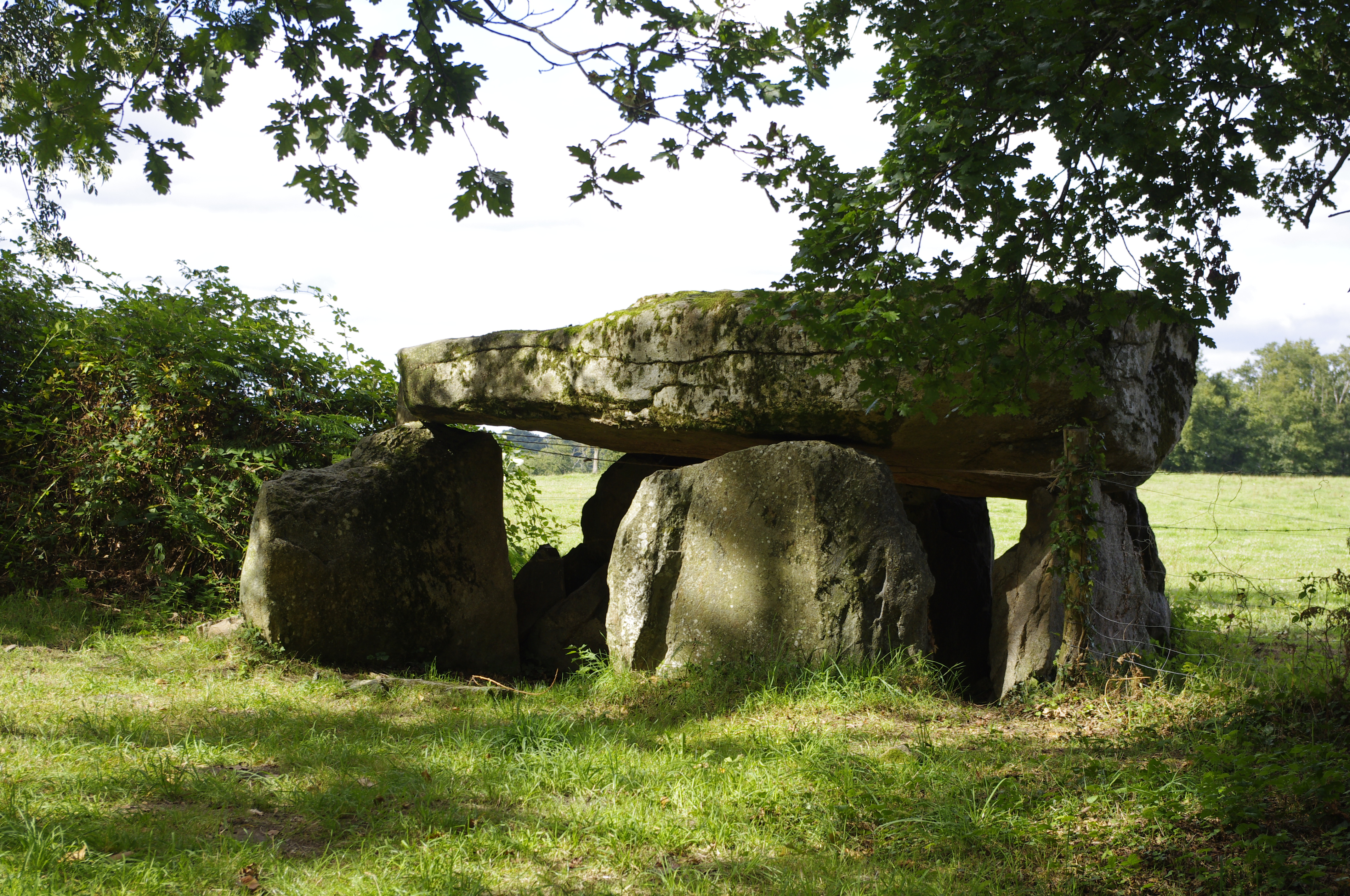 Dolmen de la Borderie, commune de Berneuil, Haute Vienne